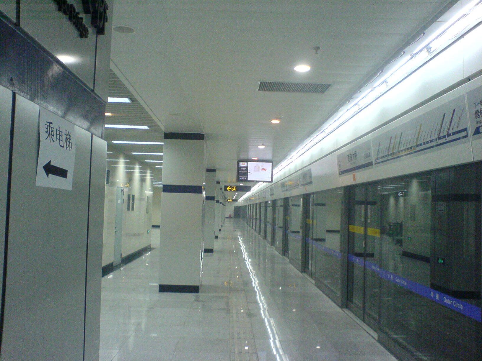 南浦大桥站内圈站台